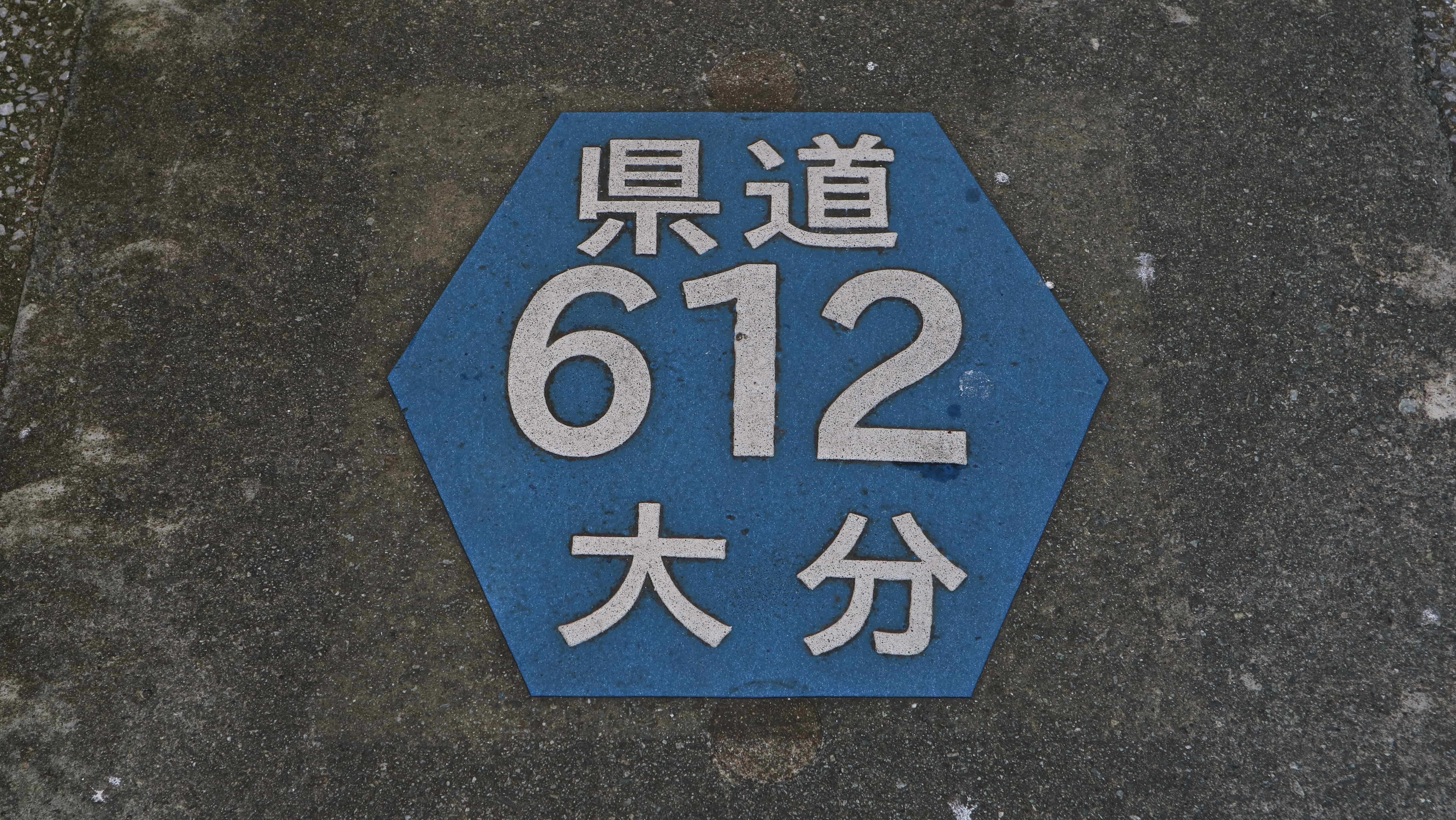 保戸島県道標識